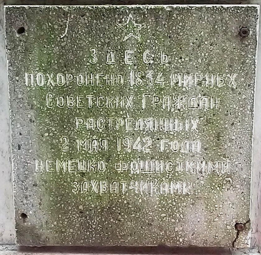 Надпись на памятнике на месте расстрела нацистами евреев посёлка Вороново Гродненской области 2 мая 1942 года. Памятник находится около улицы Советская на выезде из Вороново к трассе М11, недалеко от пересечения с улицей Железнодорожной.